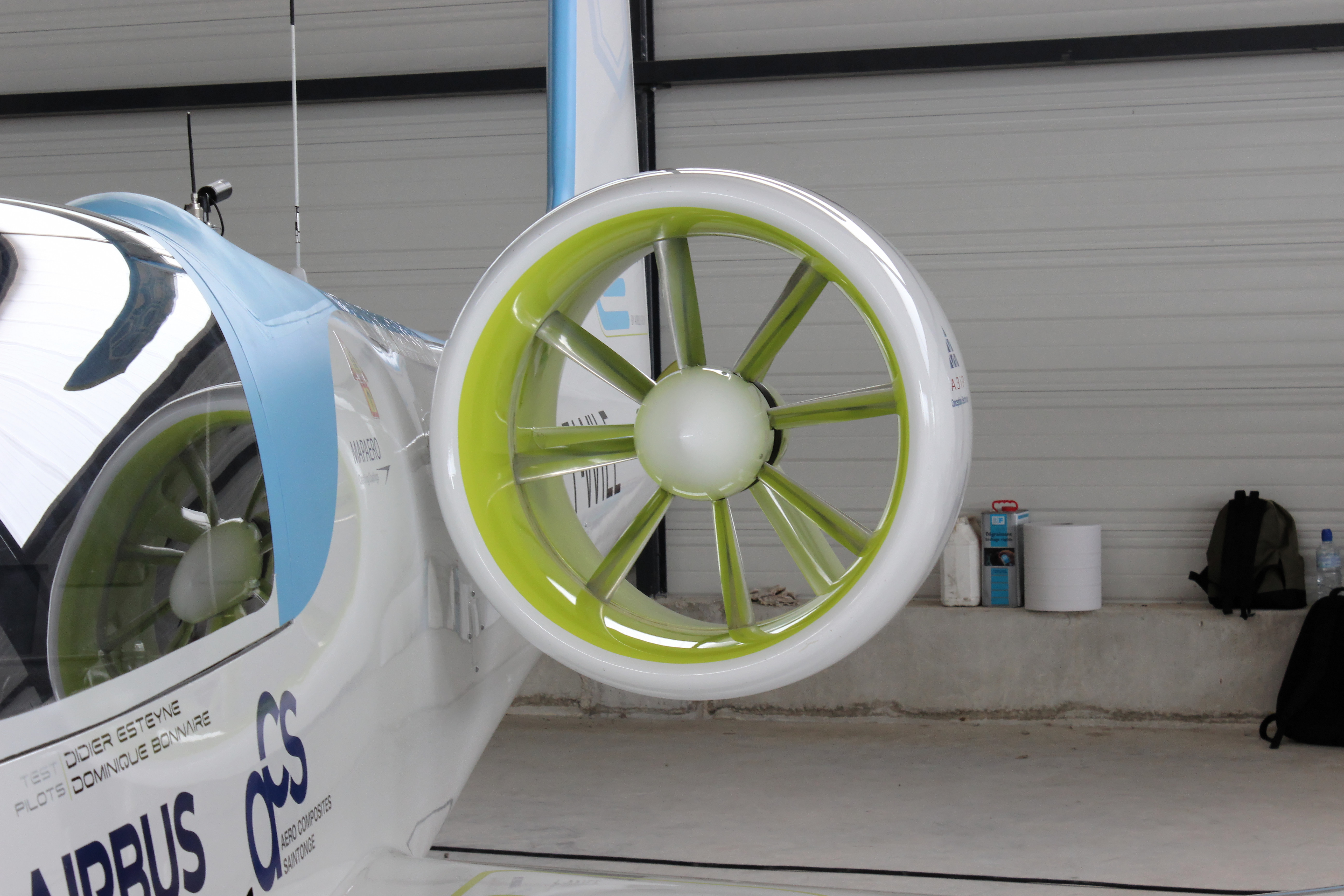 Un réacteur d'airbus E-Fan prise au Meeting de la Ferté-Alais 2014.